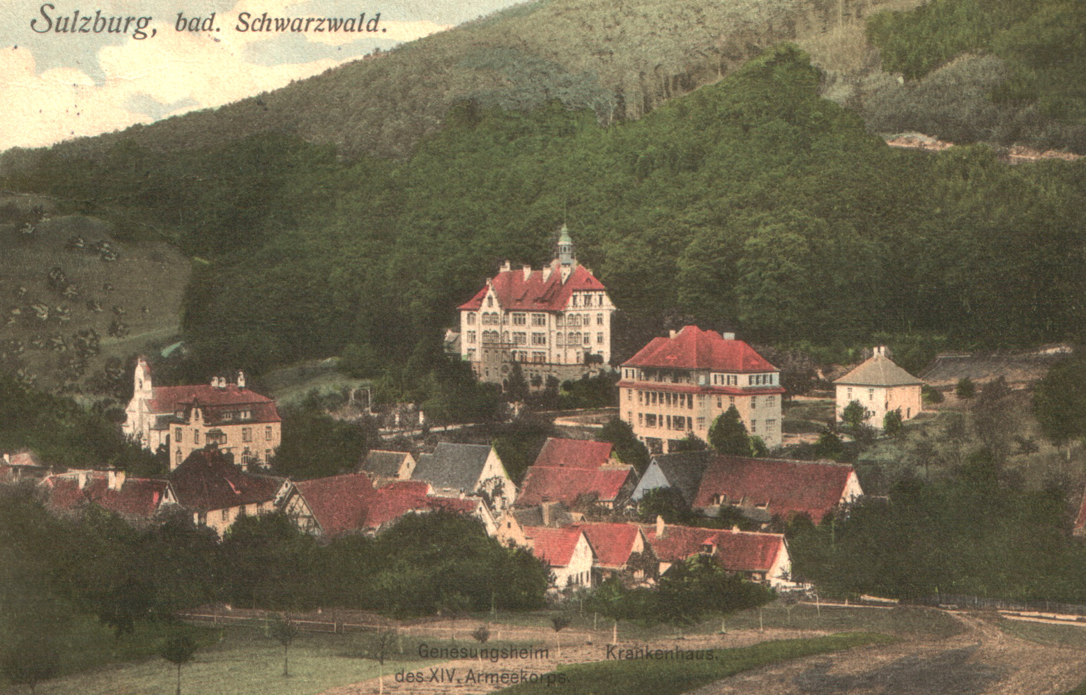 Sulzburg, Baden-Württemberg